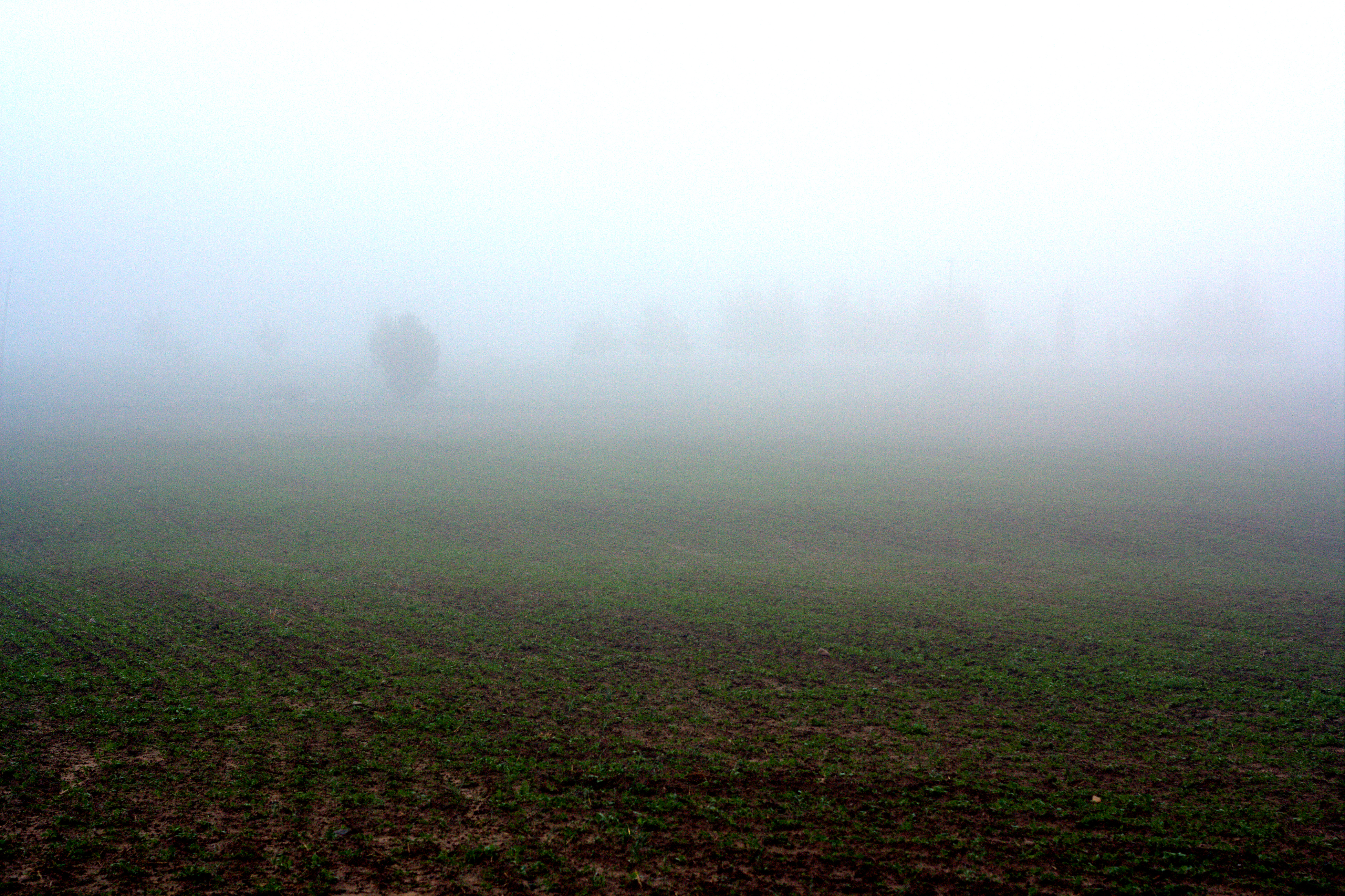 Udu Vana-Koiola külas